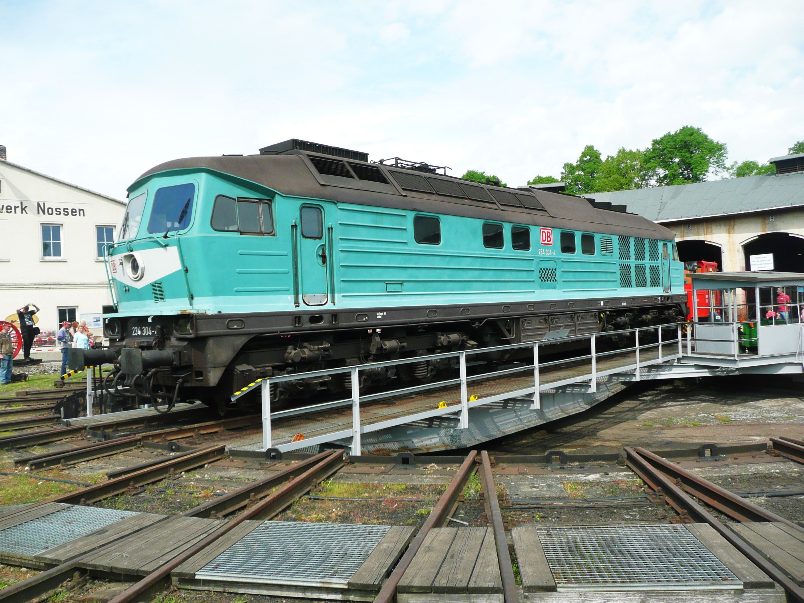 234 304 beim Tag der Offenen Tür im Bahnbetriebswerk Nossen